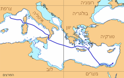 אוניית המעפילים הפורצים - מסלול